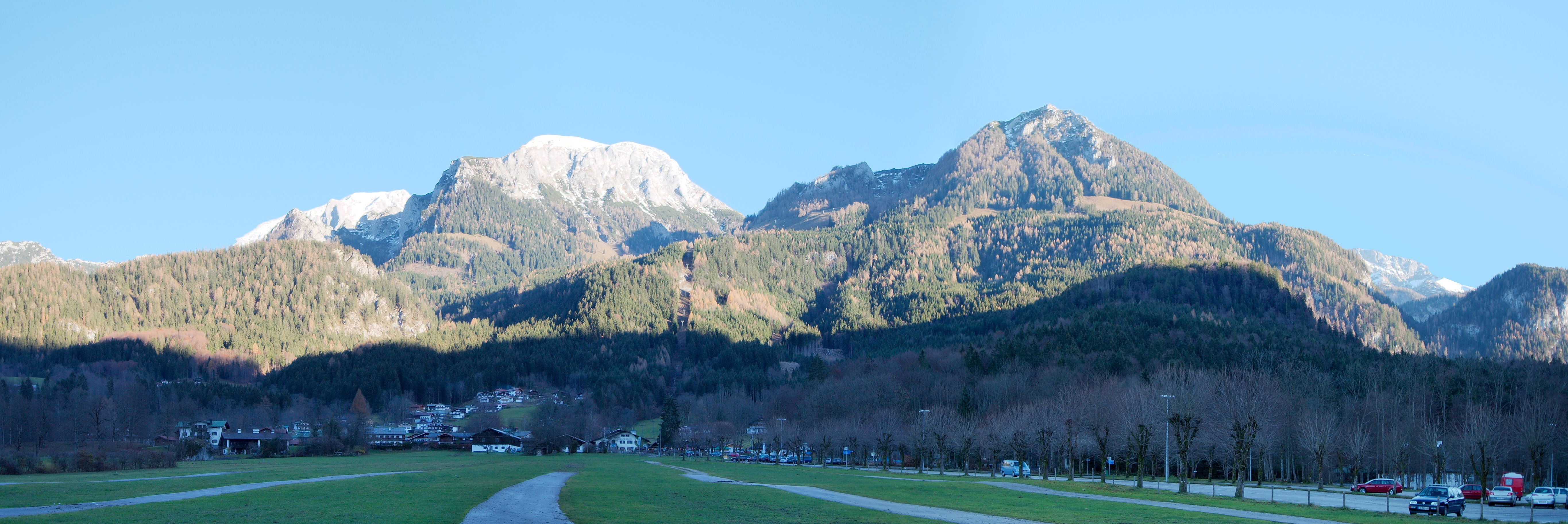 Jenner seen from Königssee